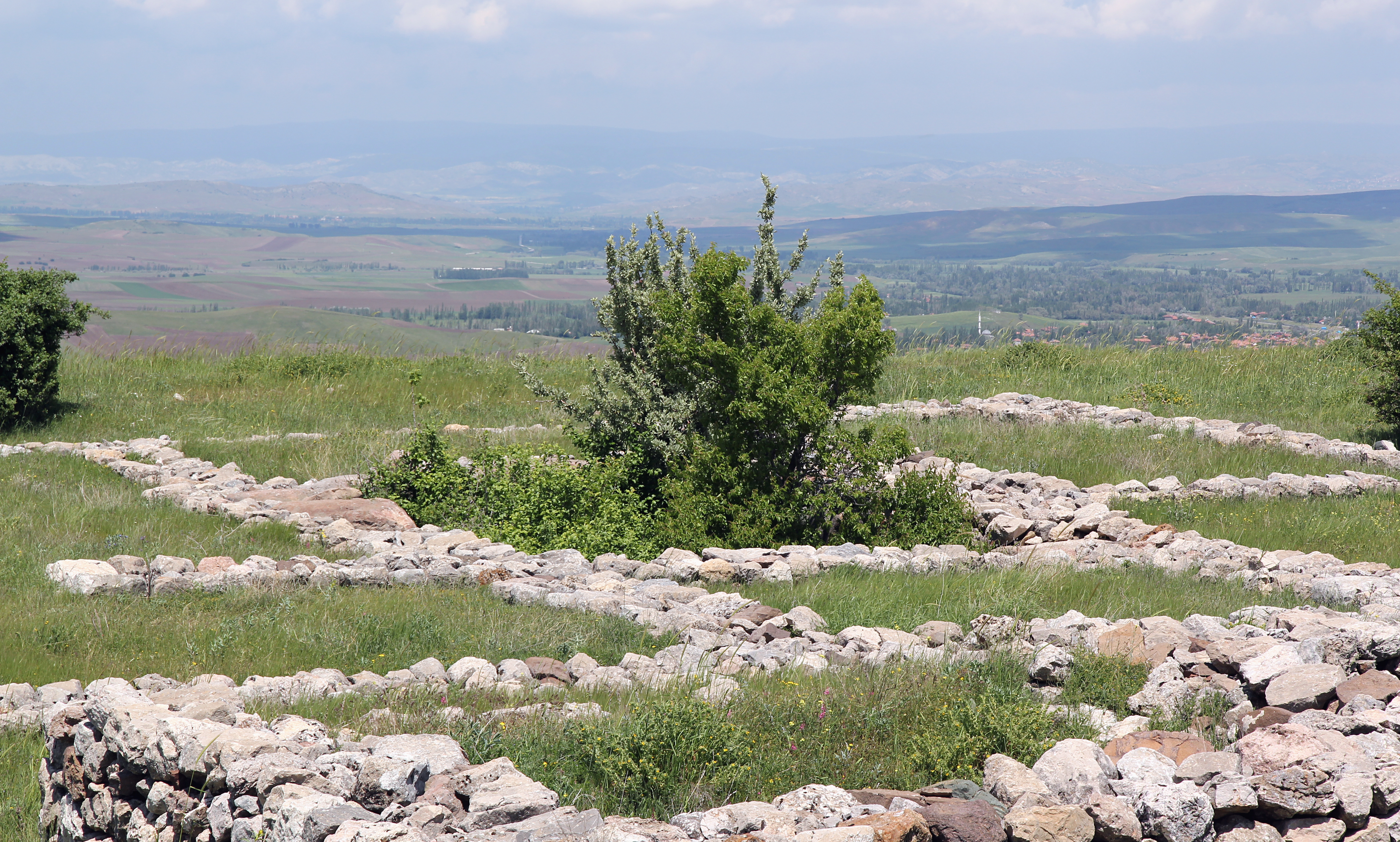 Büyükkale, die Zitadelle der hethitischen Hauptstadt Hattuša bei Boğazkale, Zentraltürkei, Gebäude C mit zentralem Kultraum